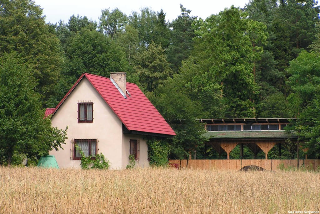 Katowice - Hamerla, Koło Łowieckie „Daniel”.